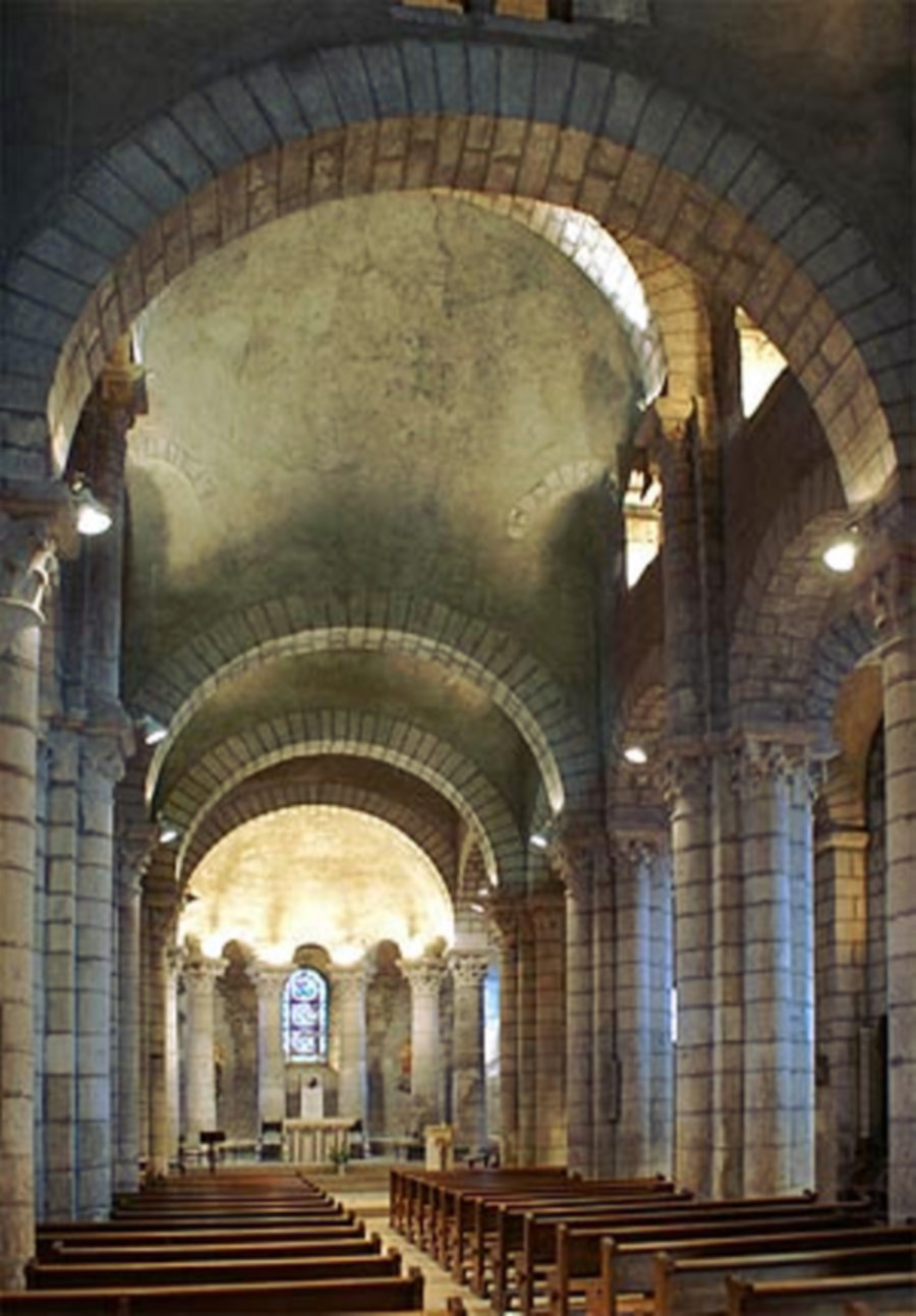 Champagne (Ardèche) détail